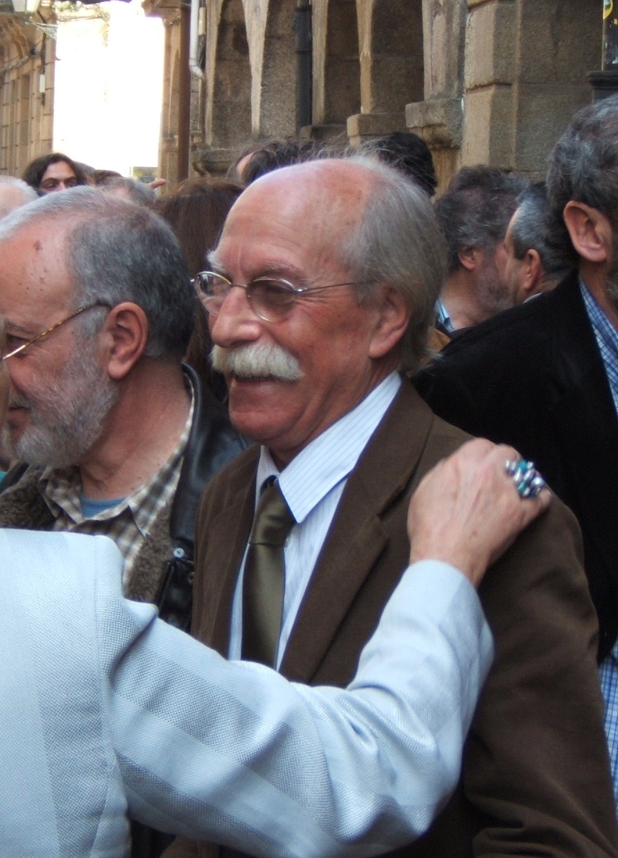 Después de un acto de homenaje en el Teatro Principal de Santiago de Compostela, el dia 14 de abril 2007.